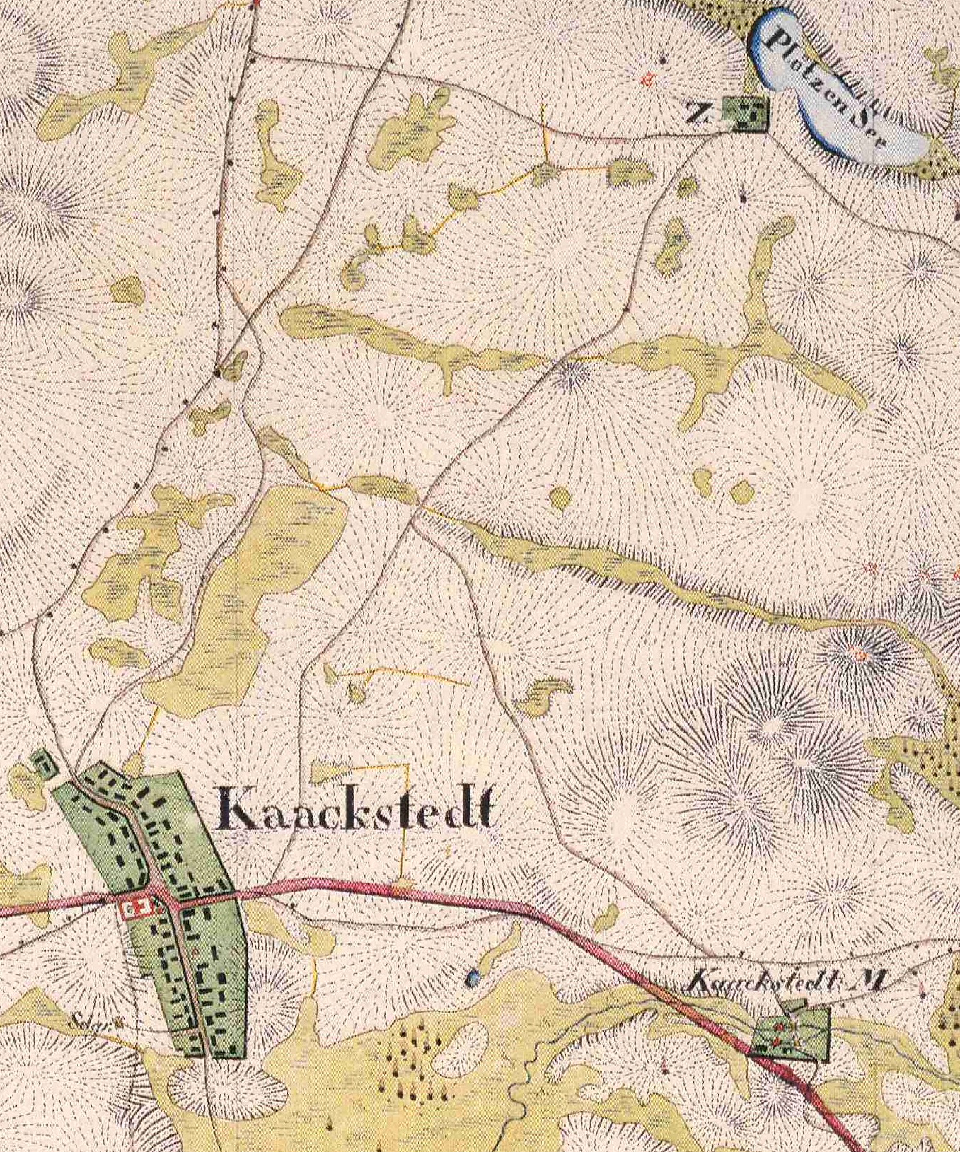 Kaakstedt und ehemaliger Wohnplatz Plötzensee, Gemeinde Gerswalde, Lkr. Uckermark, Brandenburg, Ausschnitt aus dem Urmesstischblatt 2848 Gerswalde von 1826